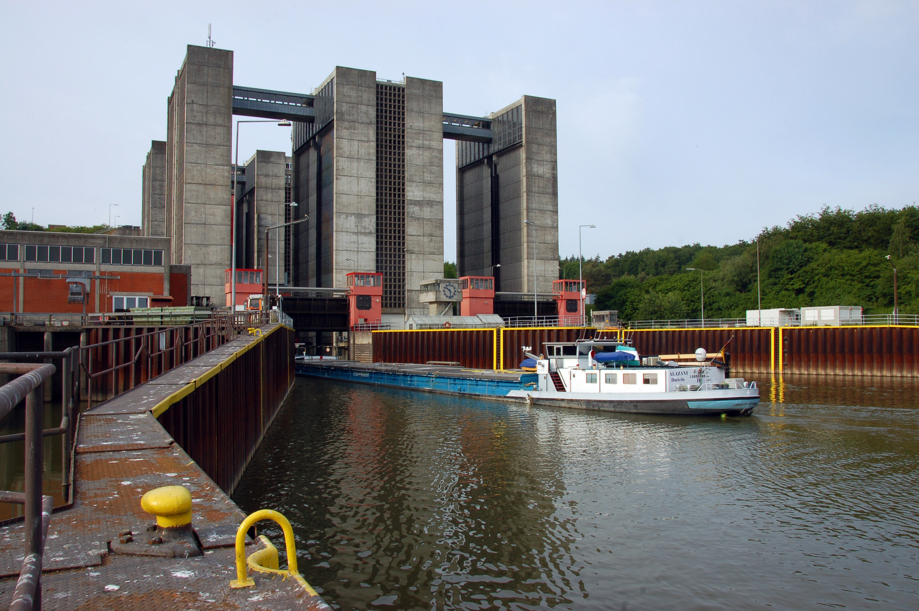 Schiffshebewerk Scharnebeck, Unterwasser